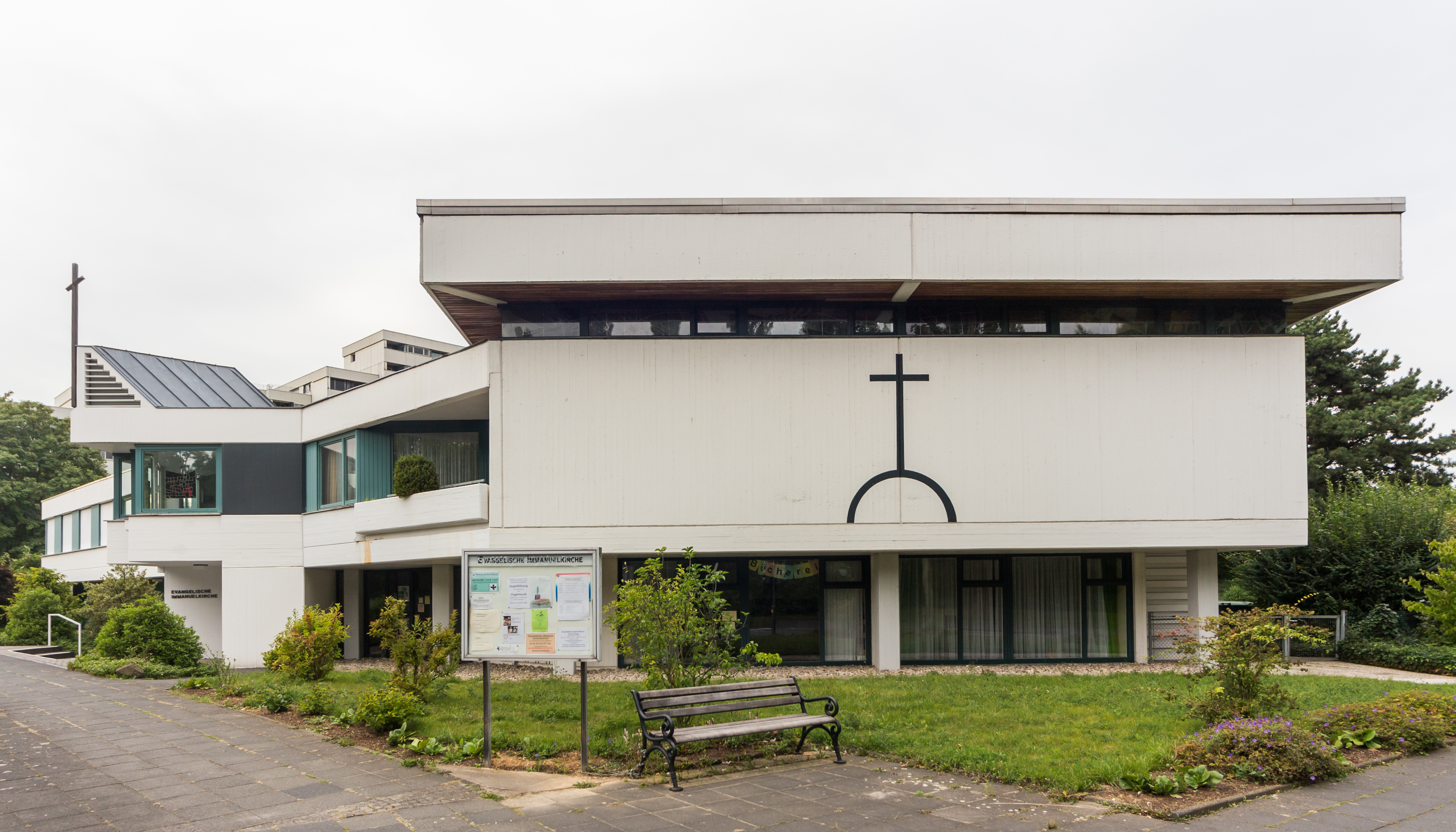 Evangelische Immanuelkirche, Tulpenbaumweg 2, Bonn-Heiderhof: Blickrichtung Nordwest